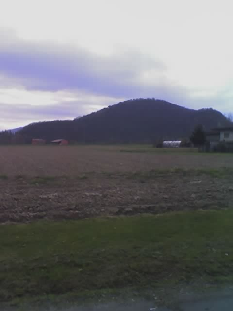 I colli Euganei visti da Feriole